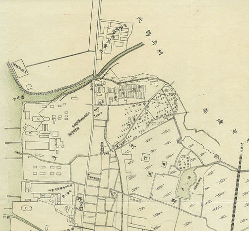 『岸和田要鑑』（市制記念岸和田要鑑編纂所、1924年）付属地図『岸和田市全図』の北部分抜粋